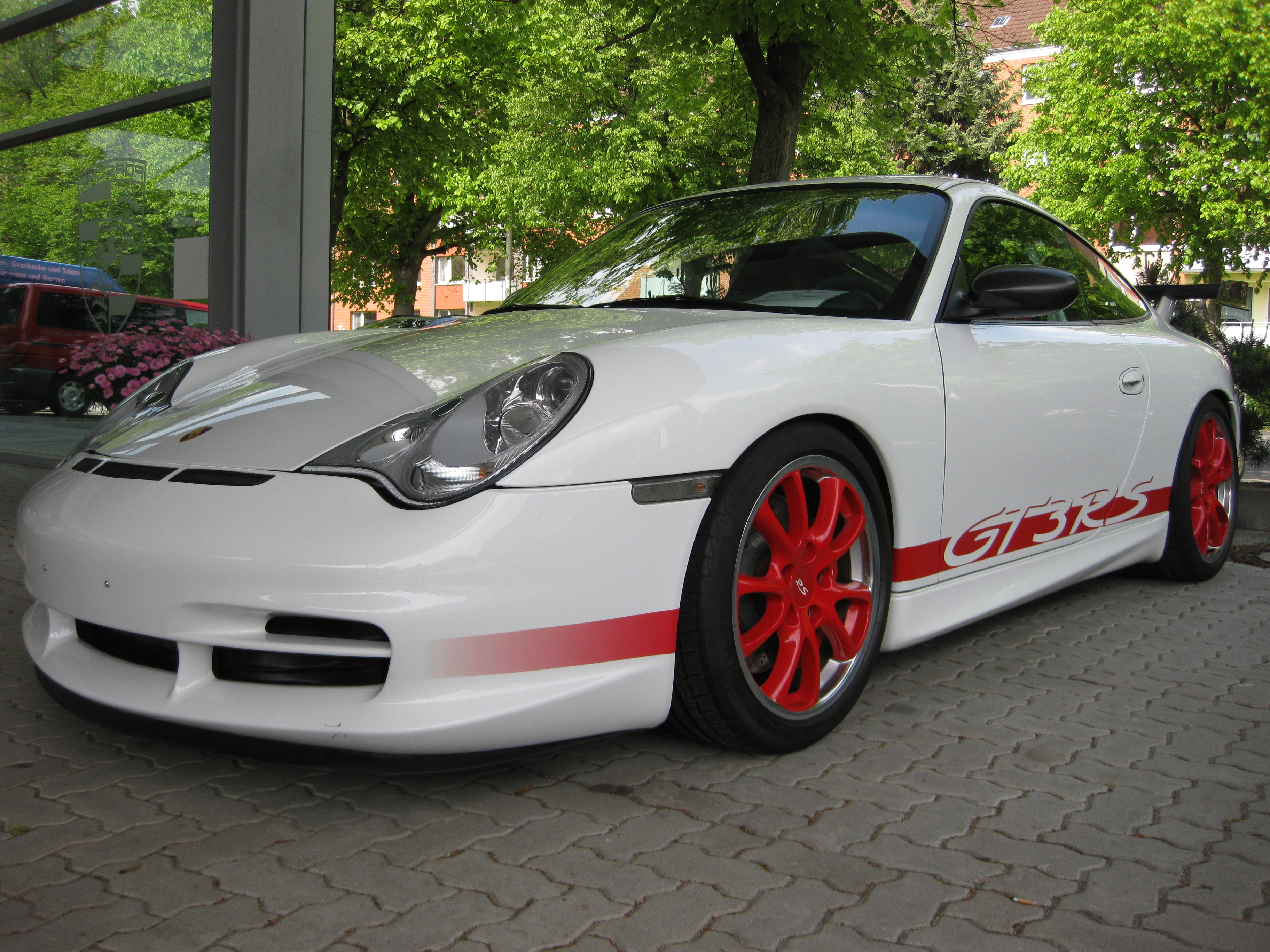 Porsche 911 Typ 996 GT3 RS